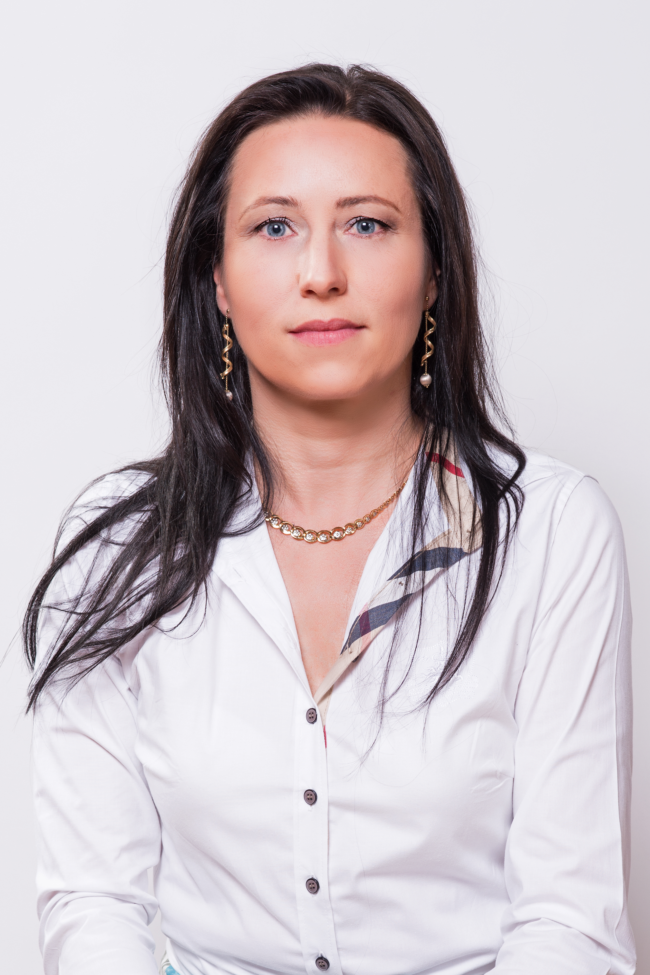 Jana Levová